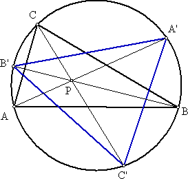 Circumcevian Triangle